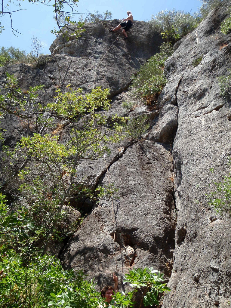 Climbing in Portugal at "Rocha da Pena"